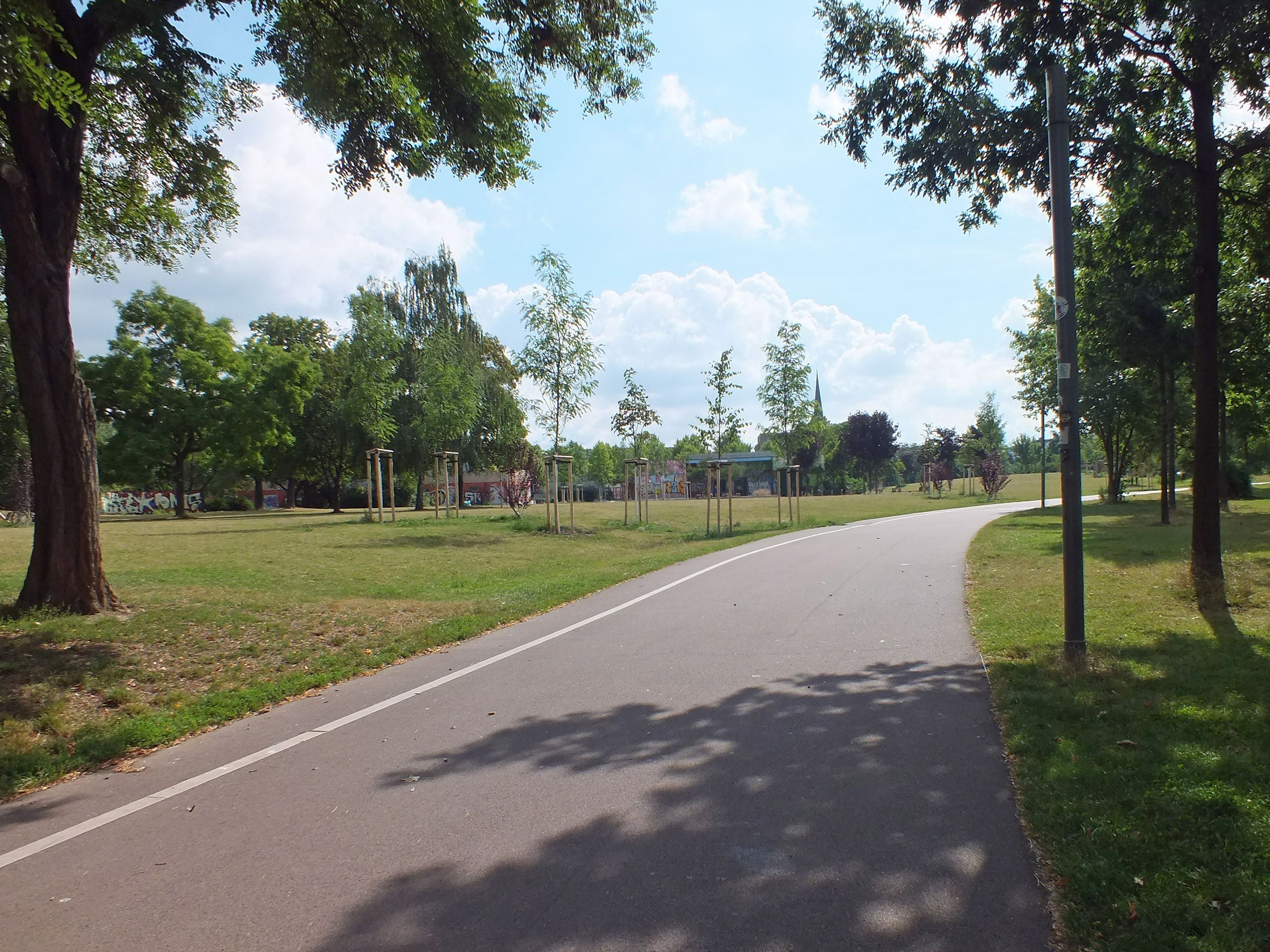 Der Rundweg, Amöbe genannt, im Leipziger Stadtteilpark Rabet